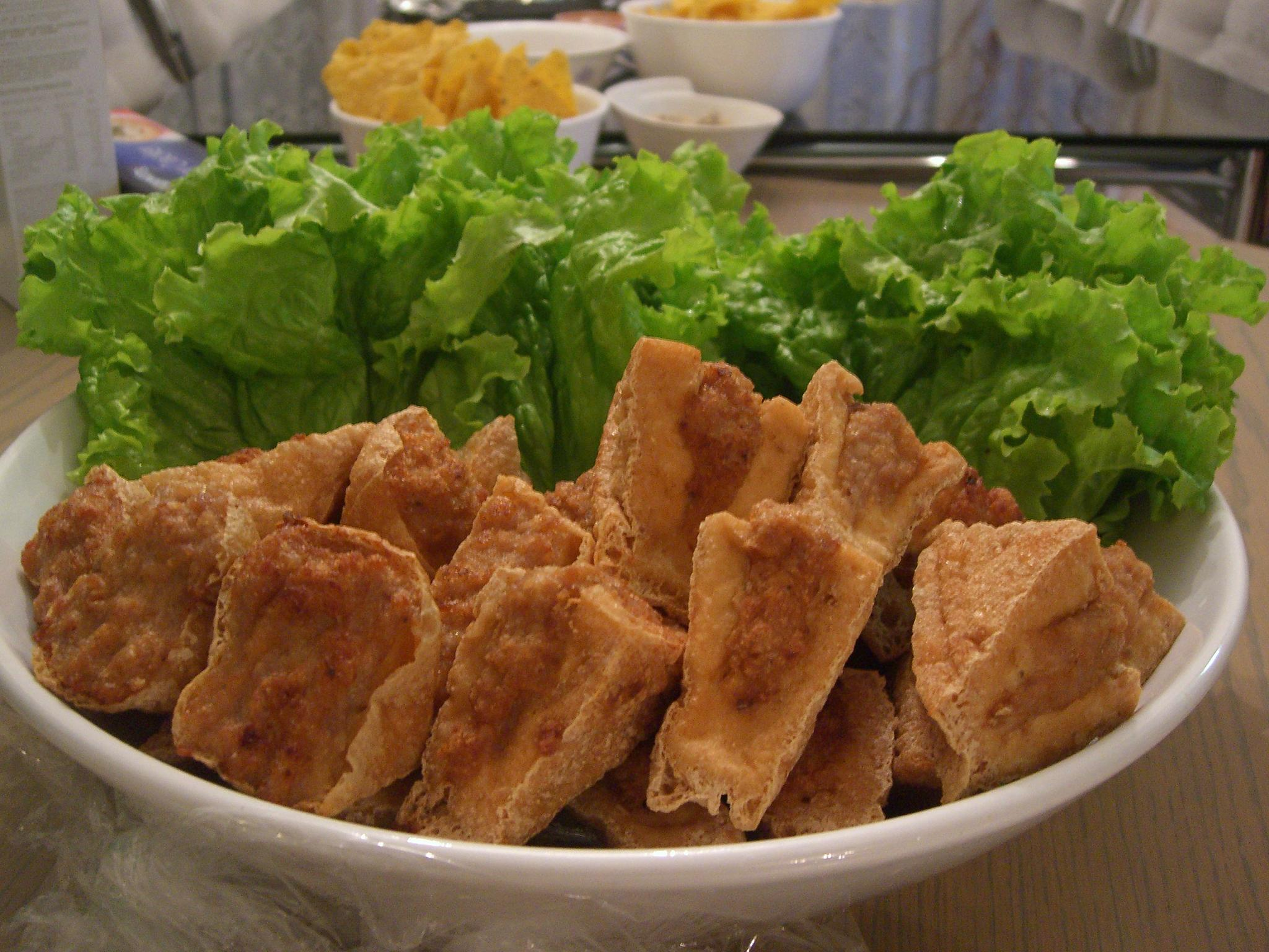 Kenny's Hakka Yong Tofu